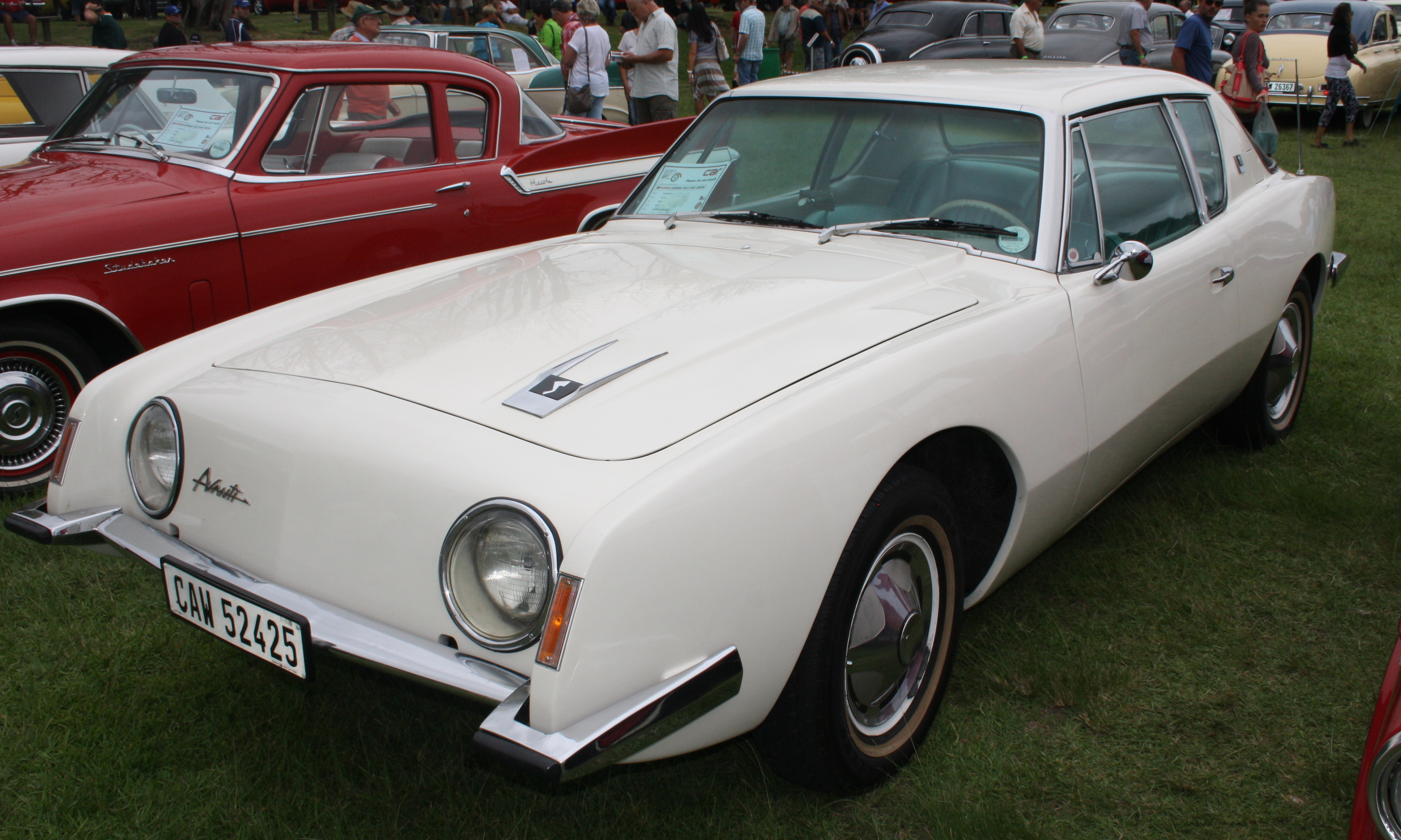 1963 Studebaker Avanti